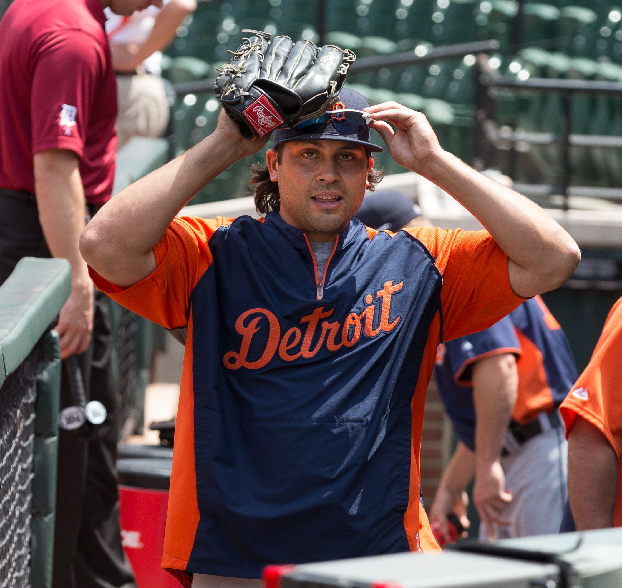 Matt Tuiasosopo